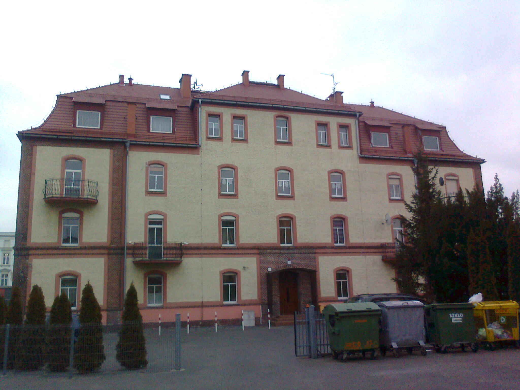 Głubczyce, byłe koszary w Głubczycach — widok od strony dawnego placu apelowego